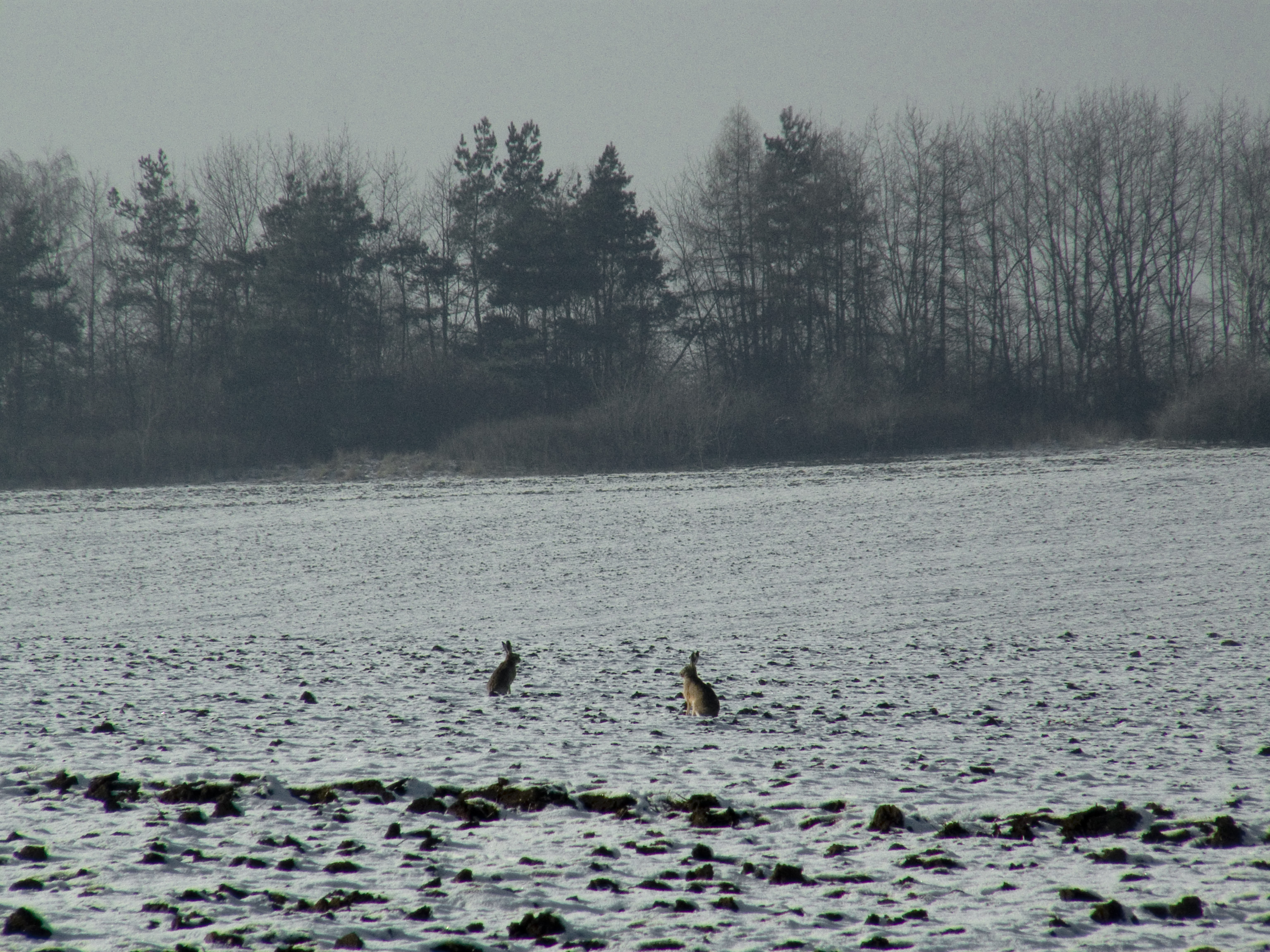 Přírodní památka Kuchyňka - zajíc polní